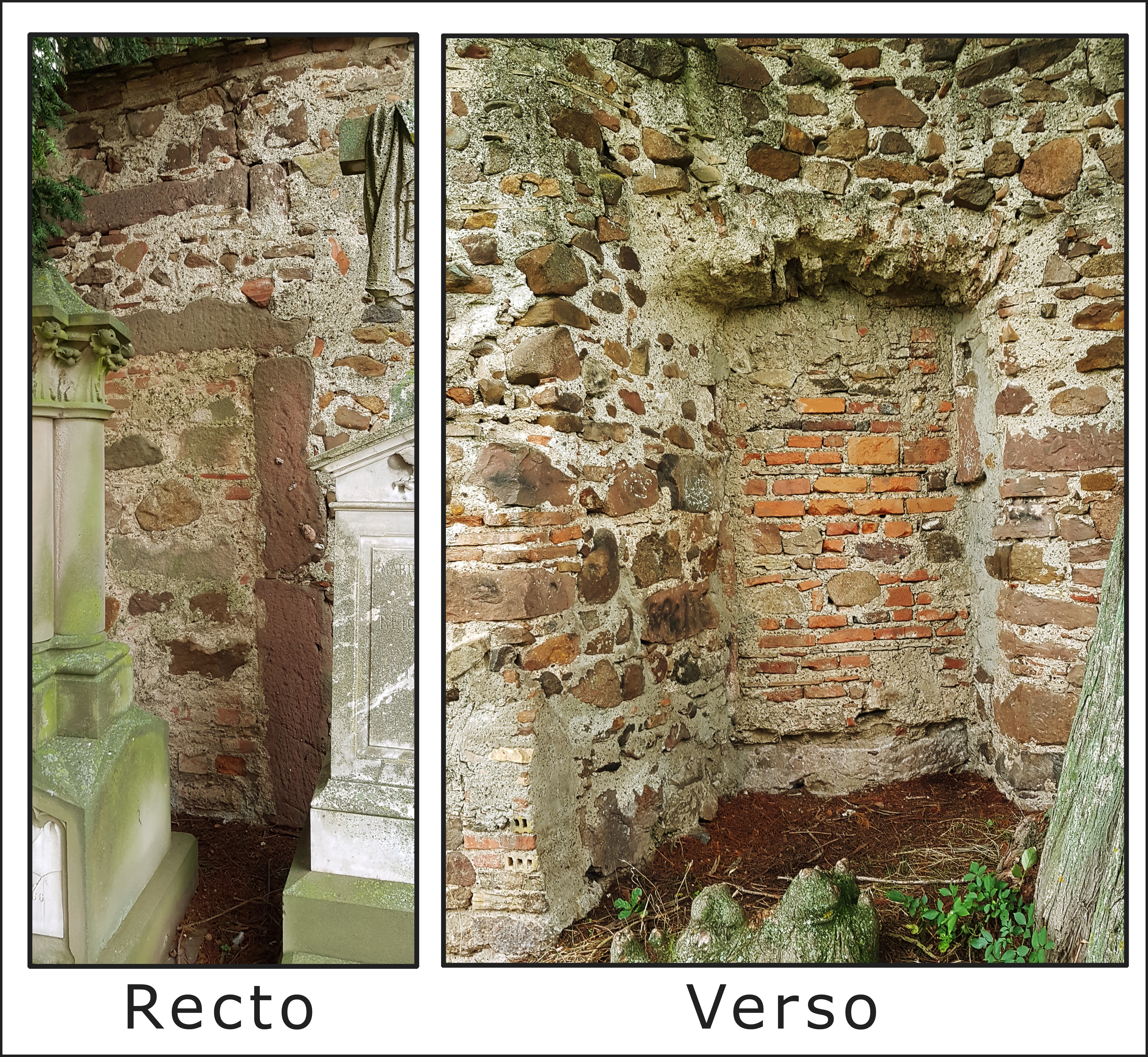 Entrée principale du cimetière possédant un pont levis mais pas de herse. La situation de cette porte a été voulue à cet endroit car elle est face au château. L'entrée du cimetière est ainsi protégée par cet ouvrage militaire.